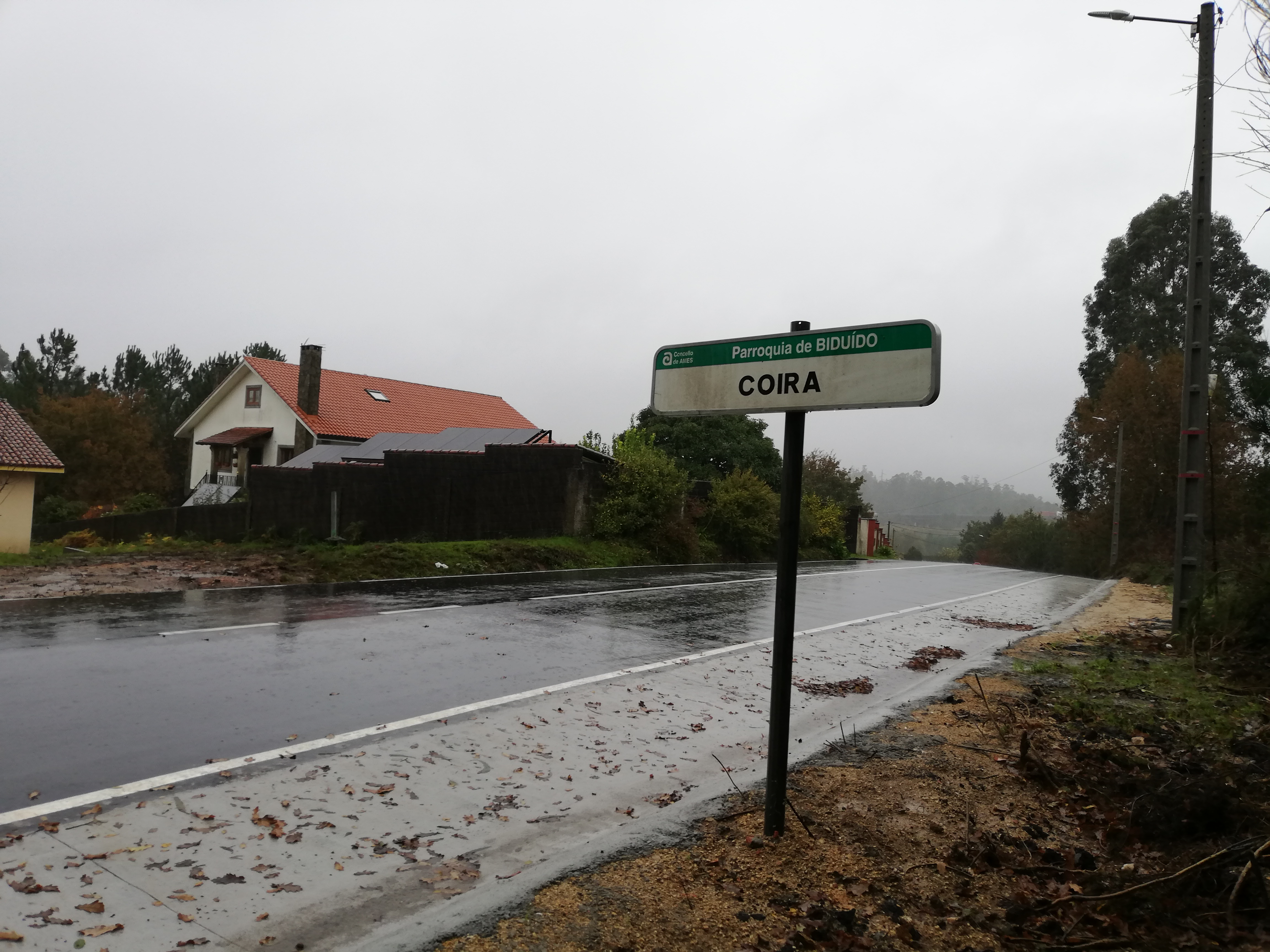 Coira, Biduído, Ames